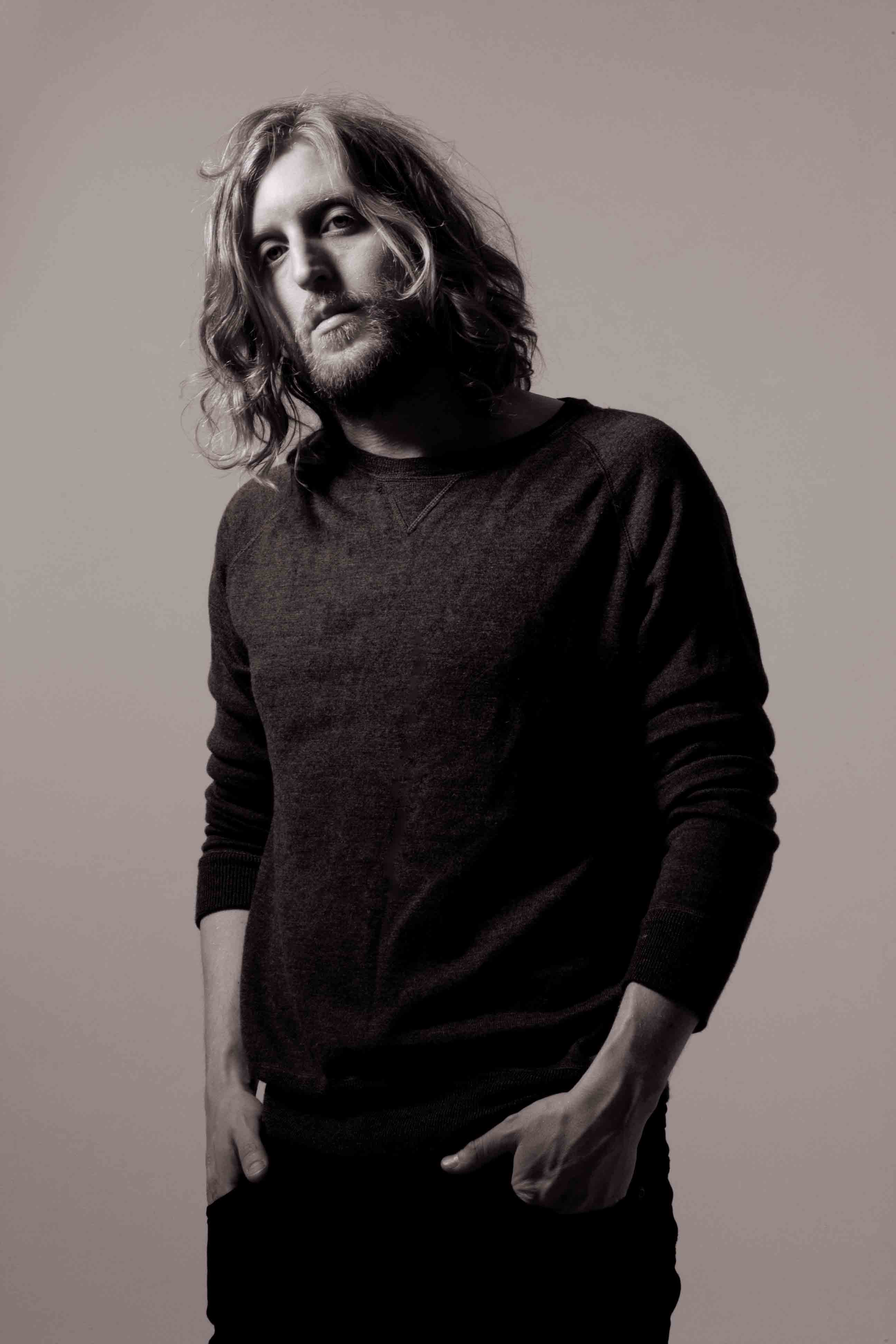 Andy Burrows